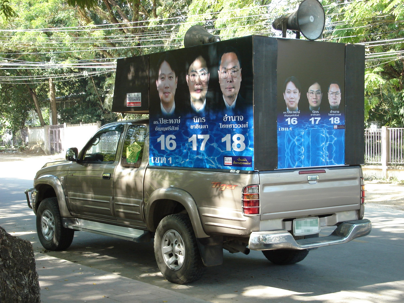 รถหาเสียง ผู้สมัครระบบแบ่งเขต พรรคเพื่อแผ่นดิน -- Chiang Mai, Thailand